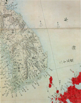 동판 조선국 전도